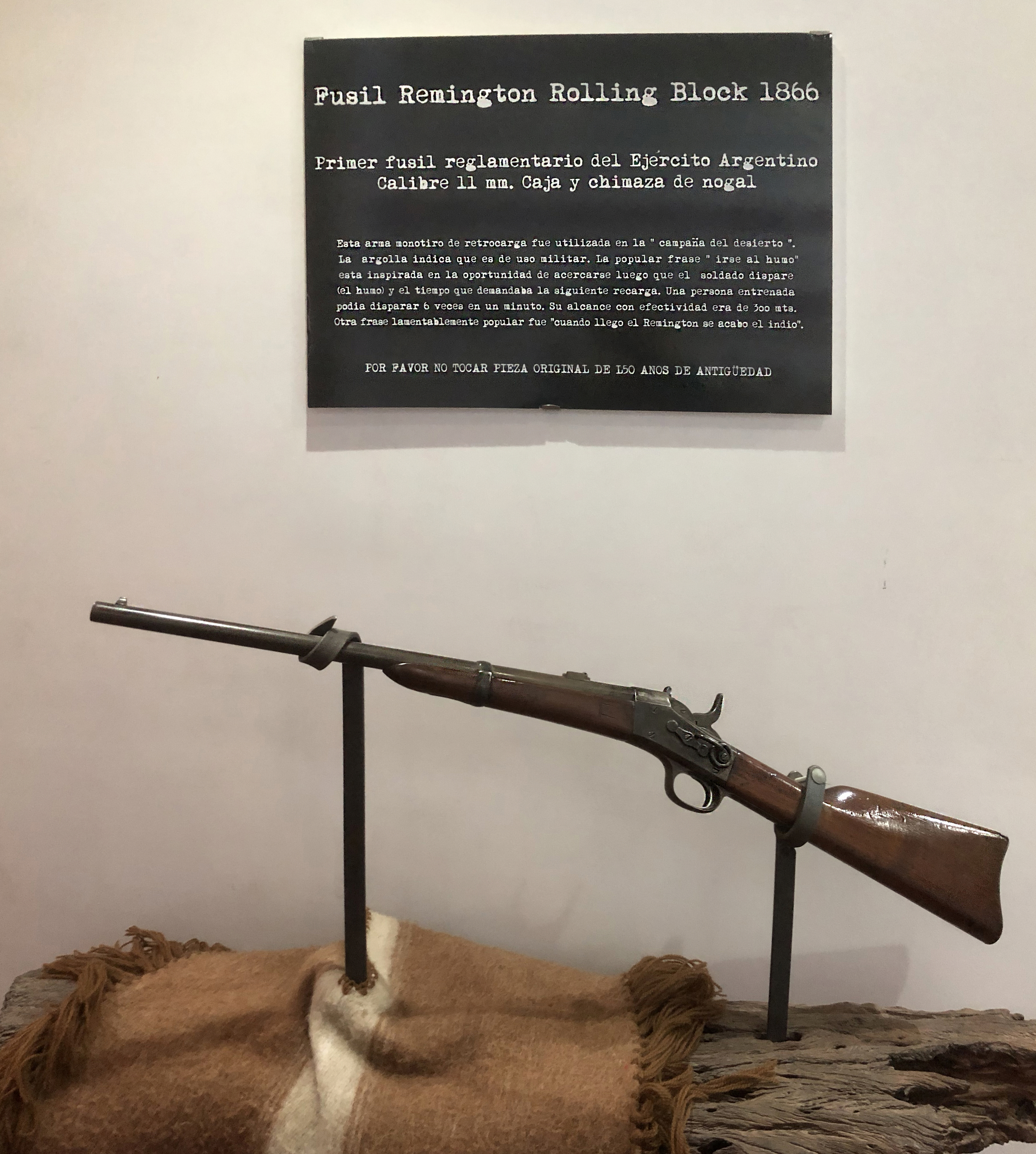 Rifle remington usado en la Conquista del desierto, foto tomada en un museo en Calafate, Argentina.